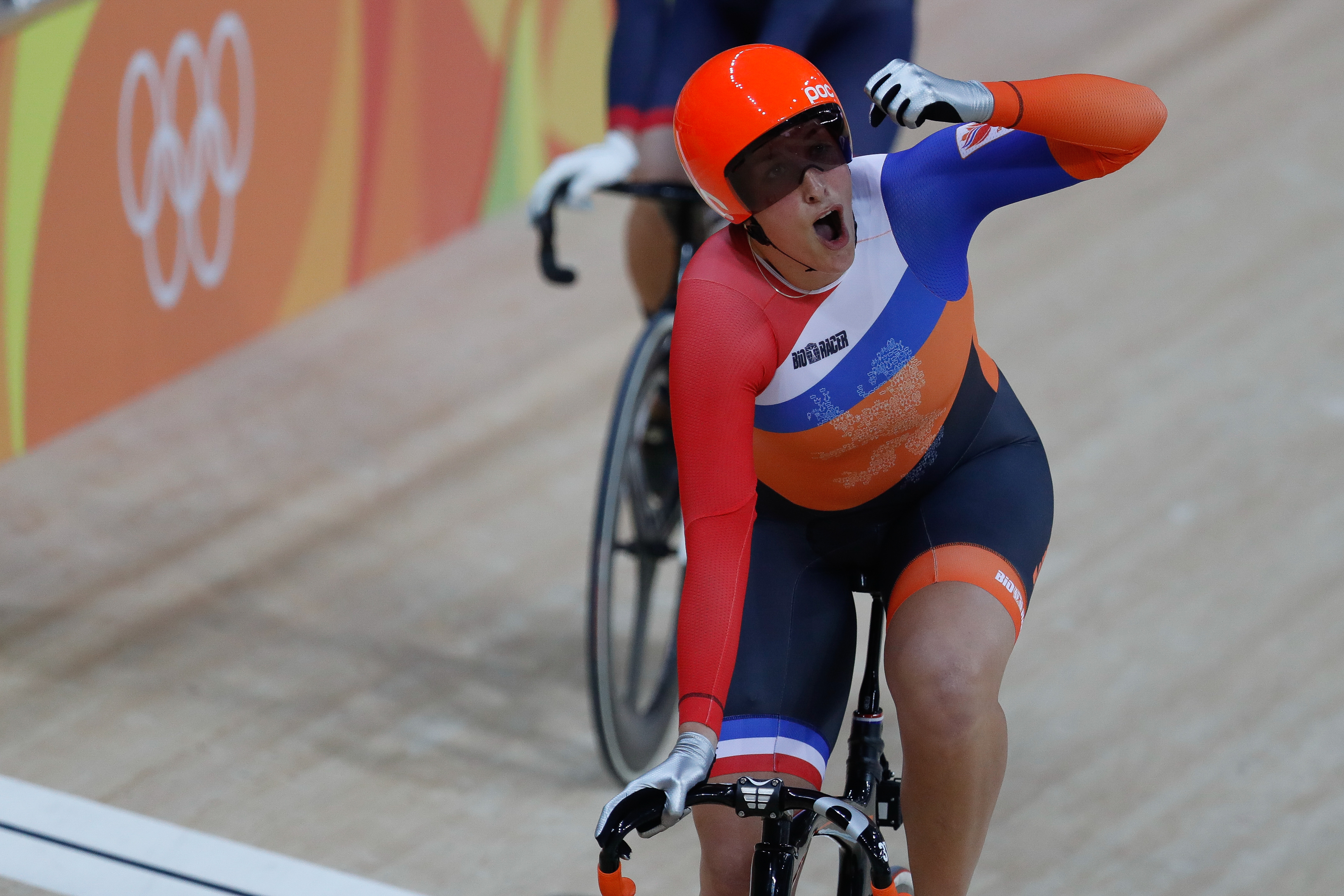 Rio de Janeiro - A holandesa Elis Ligtlee ganha medalha de ouro ao vencer a corrida Keirin de ciclismo no Velódromo dos Jogos Rio 2016, no Parque Olímpico.